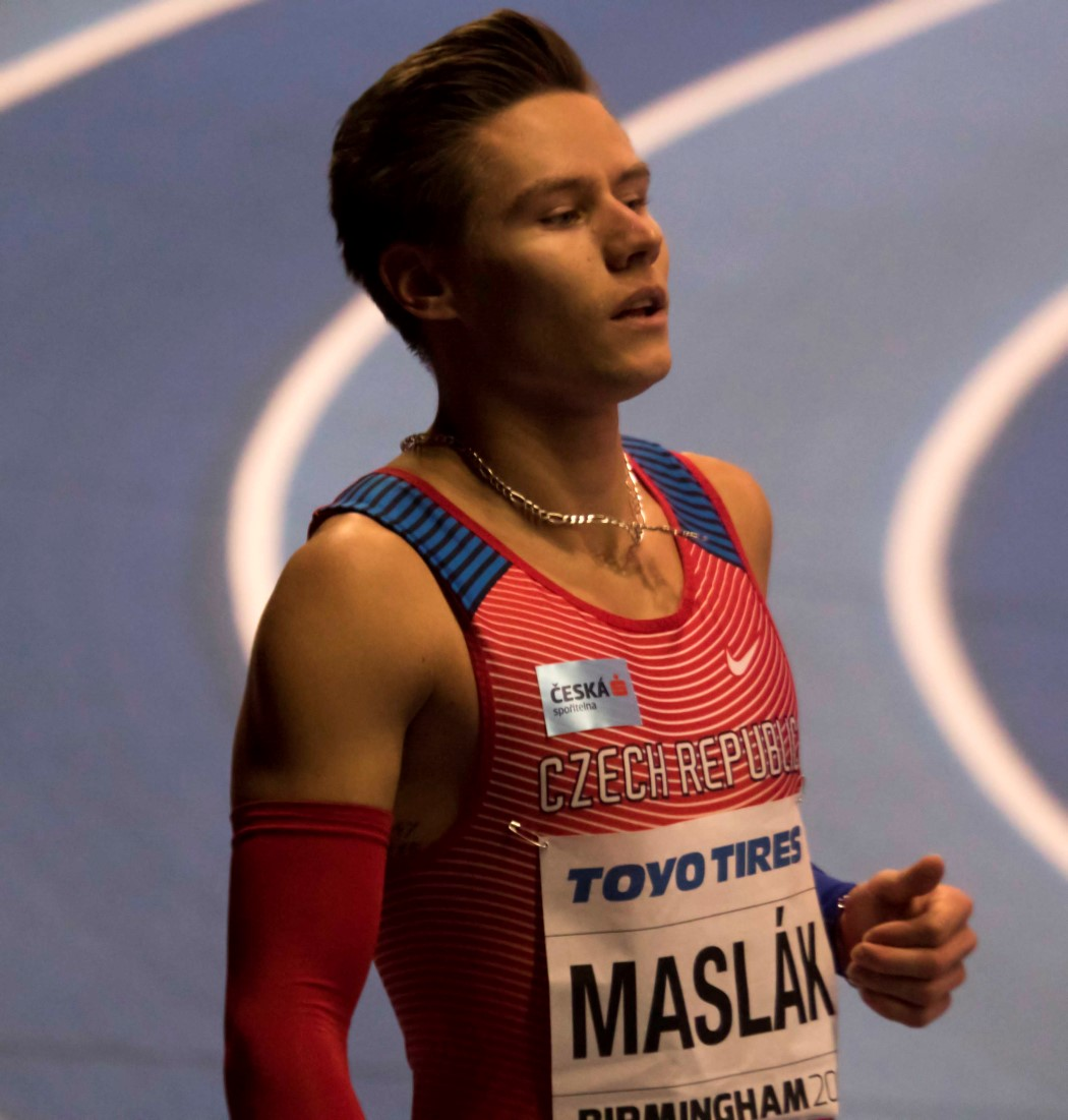 WK020077 maslak